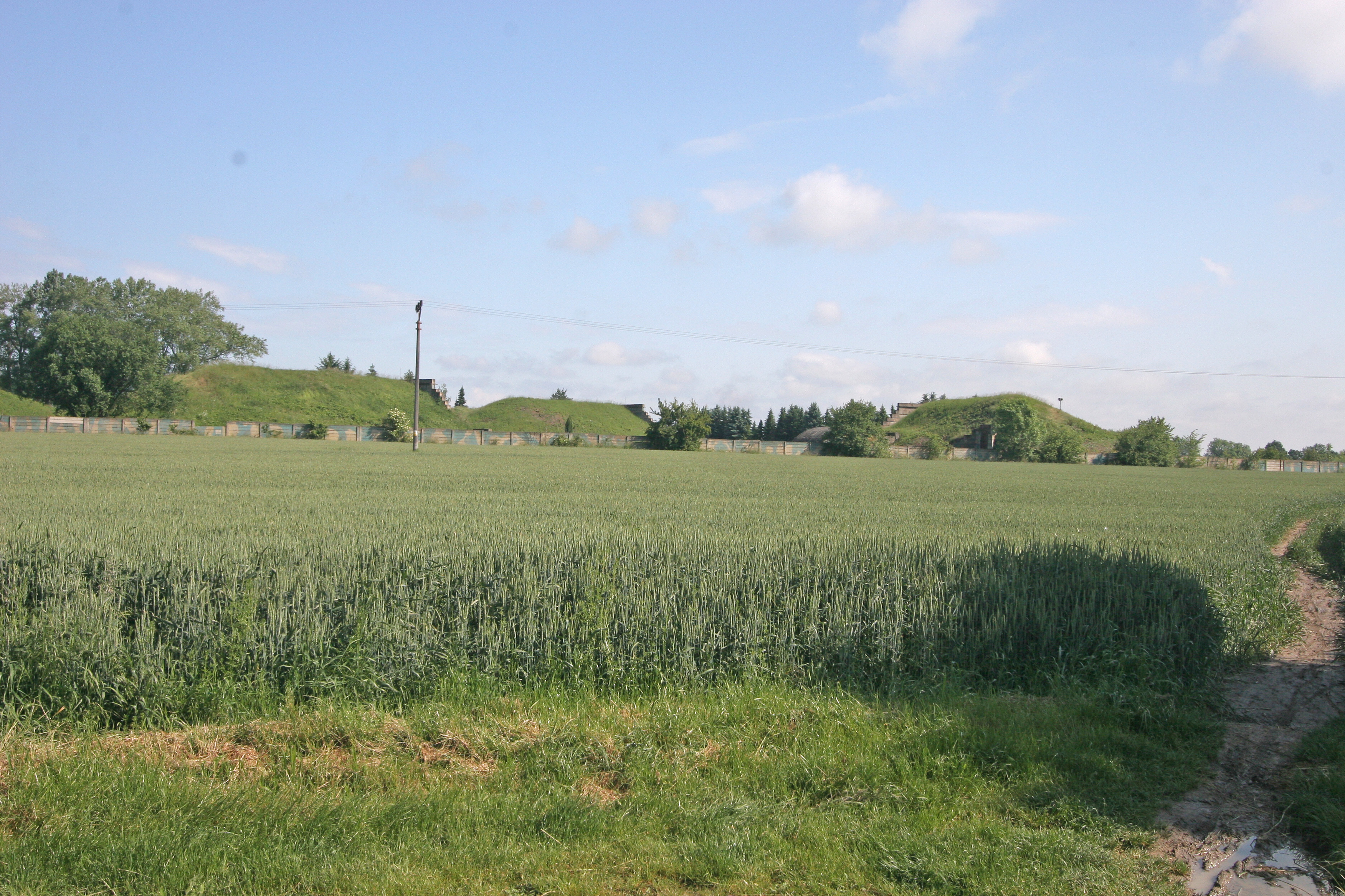 Starý Mateřov pohled na bunkry letiště